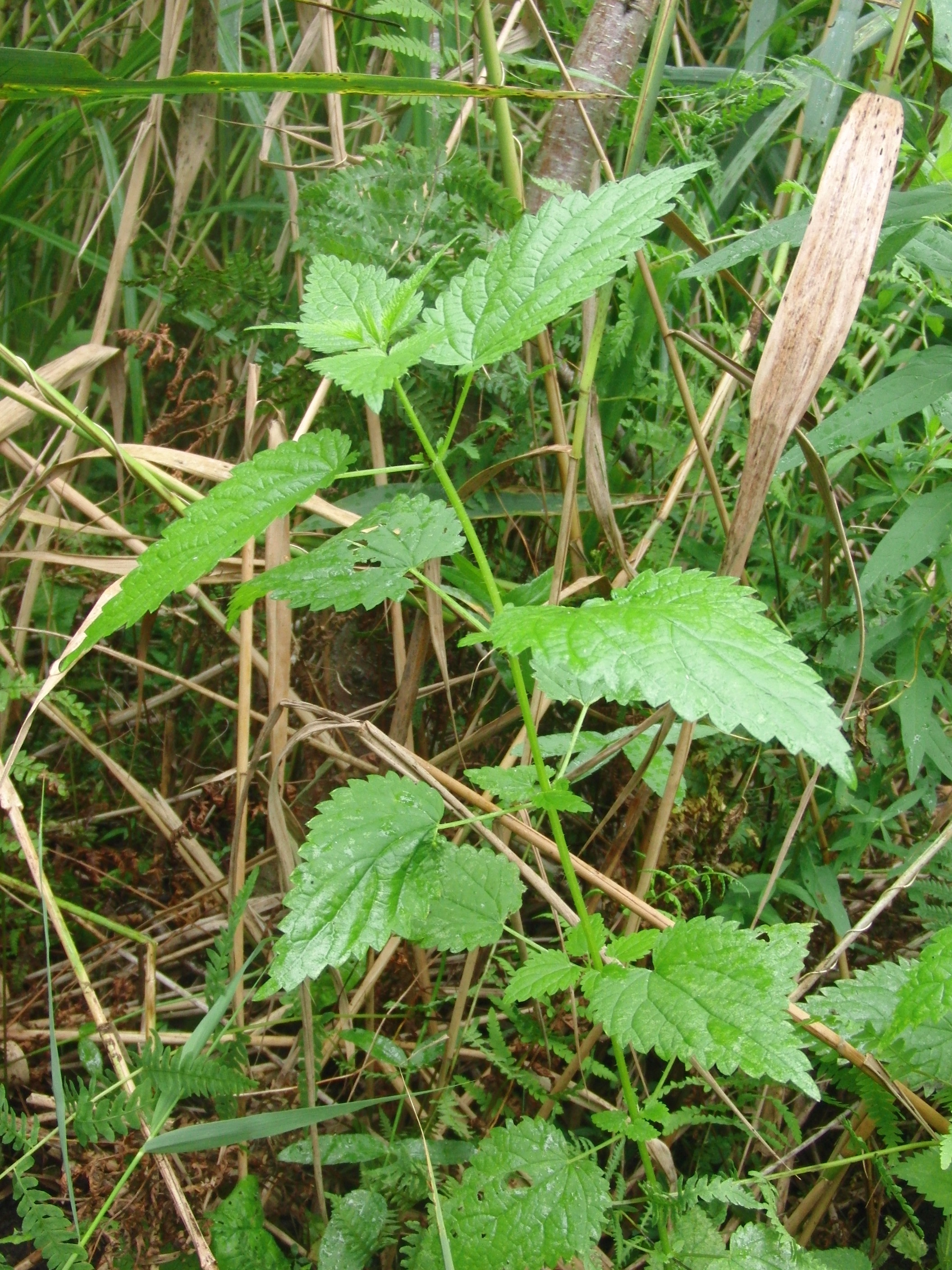 Sumpf-Brennnessel (Urtica kioviensis) im Havelgebiet, Deutschland